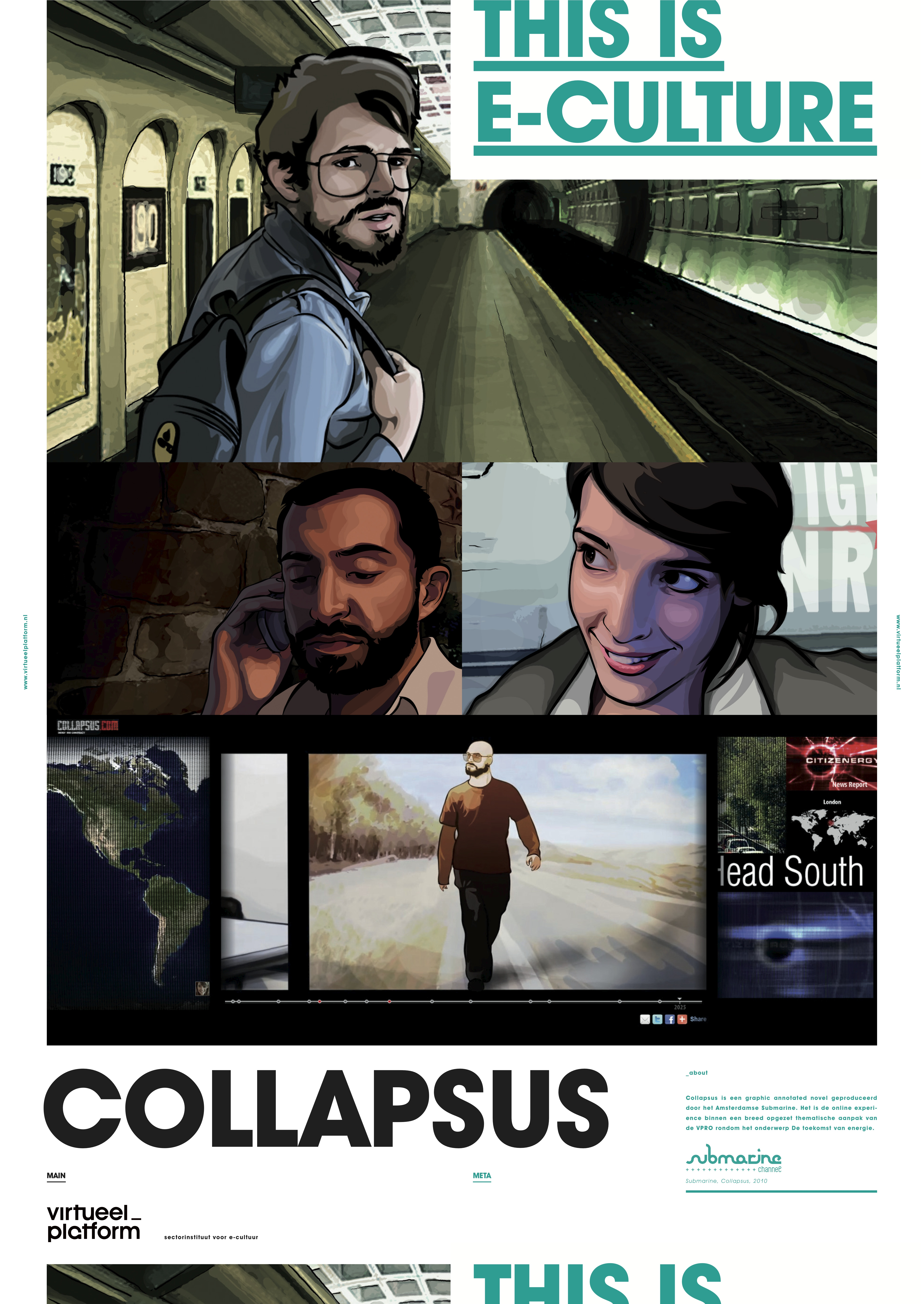 Best Practices zijn inspirerende voorbeelden van Nederlandse e-cultuur. Collapsus is een graphic annotated novel geproduceerd door het Amsterdamse Submarine Channel Het is de online experi- ence binnen een breed opgezet thematische aanpak van de VPRO rondom het onderwerp De toekomst van energie. Zie voor meer informatie